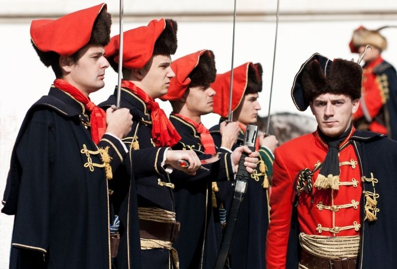 Dan kravate 2012.